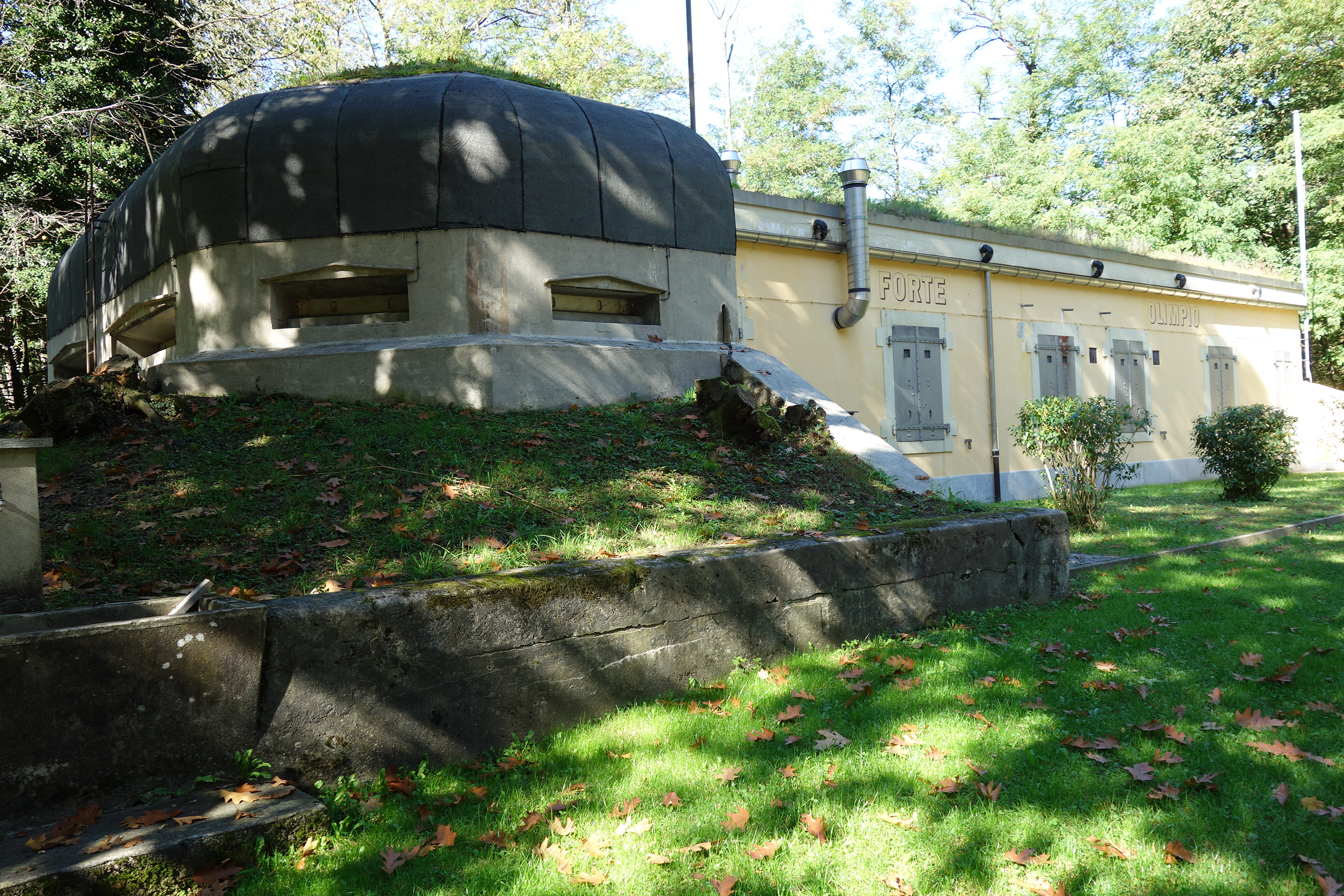 Unteres Blockhaus Forte Olimpio A 8064, Magadino TI, Schweiz